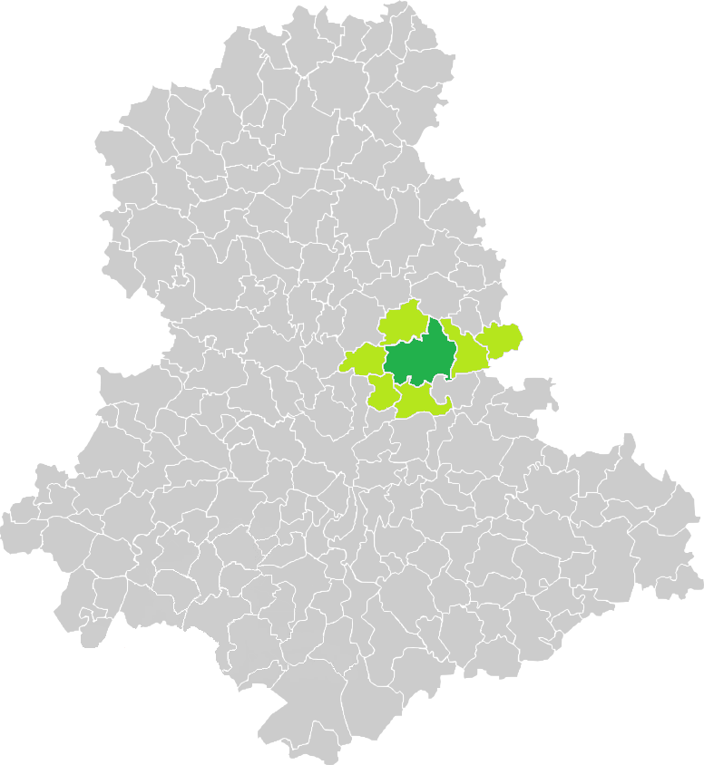 Carte de situation de la commune d'Ambazac (en vert foncé) dans le votre Canton (en vert clair) sur une carte des communes de la Haute-Vienne